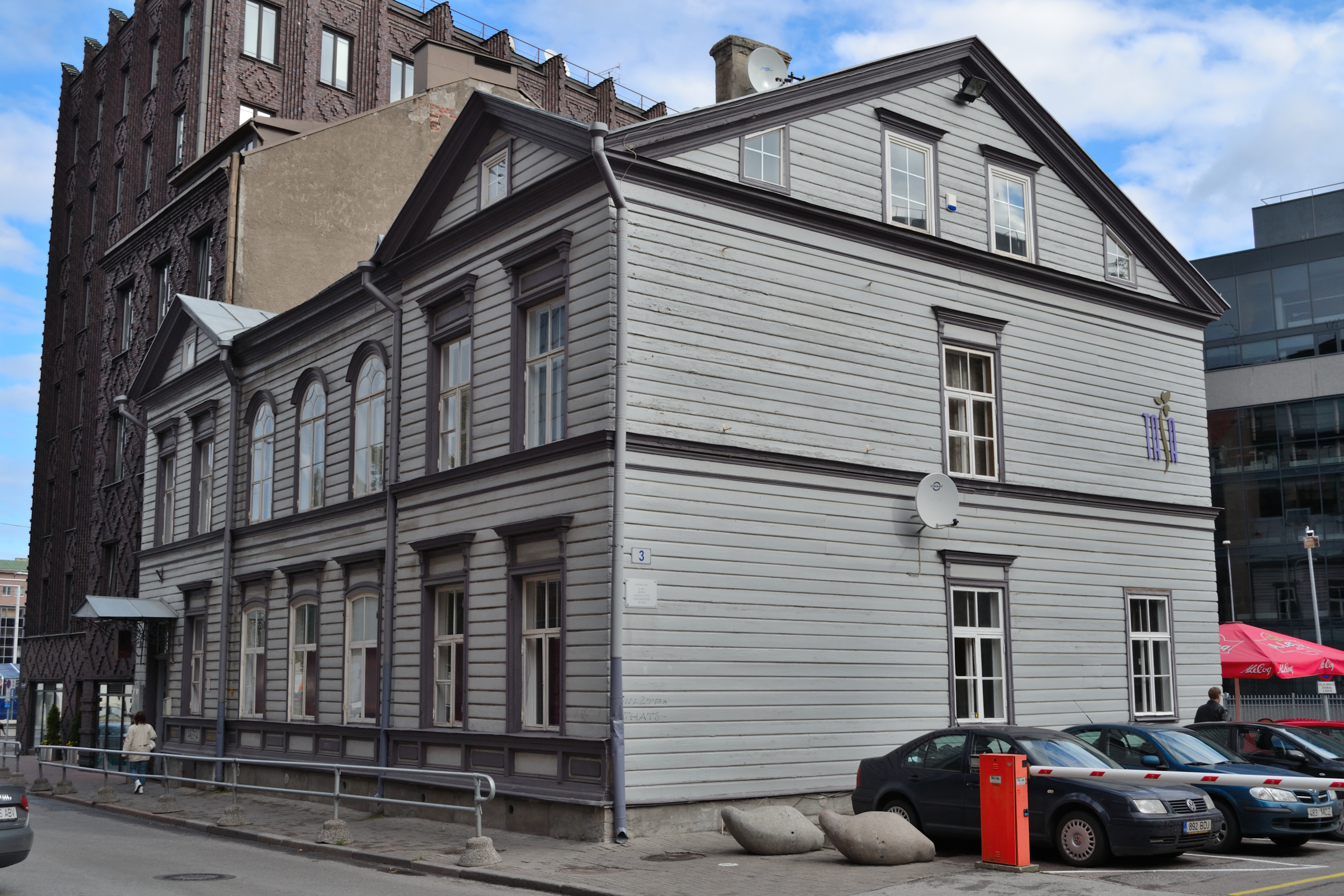 Tallinn, elamu Roosikrantsi 3, 1878